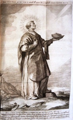 Sint-Werenfridus